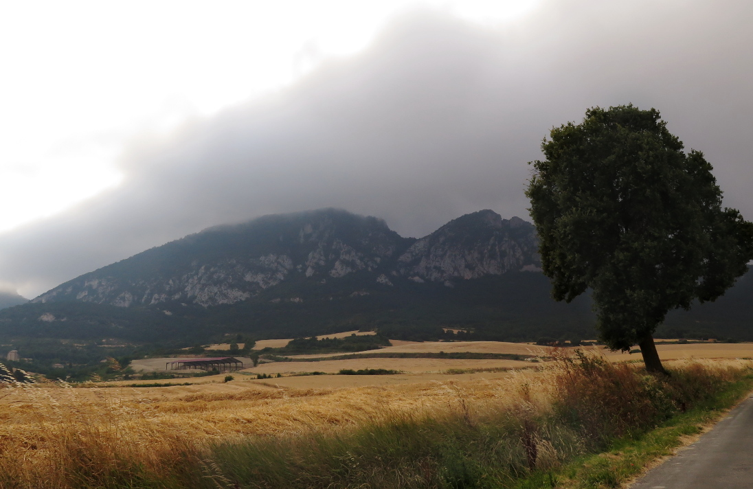 Monte Bachicabo desde los campos correspondientes al pueblo del mismo nombre (Álava, España)